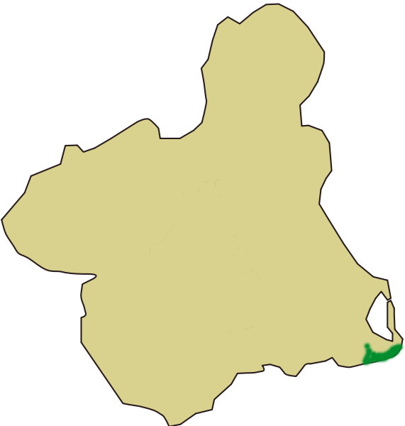 Situación del espacio protegido